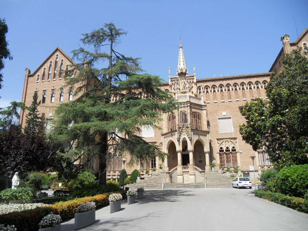 Col·legi de Jesús-Maria (Barcelona)